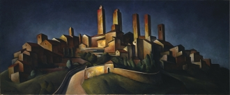 Alexander Kanoldt: San Gimignano; 1922, Öl auf Leinwand, 54 x 134 cm; Museumslandschaft Hessen, Kassel; Inv. Nr. M 1979/7